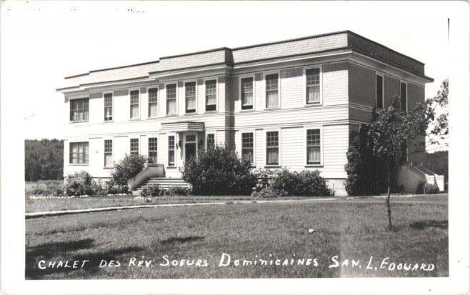 Carte postale intitulée "Chalet des Révérendes Sœurs Dominicaines Sanatorium du Lac Édouard". Ces cartes étaient achetées par les malades de la tuberculose qui les expédiaient à leur famille.